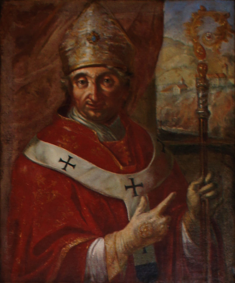 Porträtgemälde von Egilbert von Moosburg, Bischof von Freising, im Fürstengang zwischen Fürstbischöflicher Residenz und Freisinger Dom.